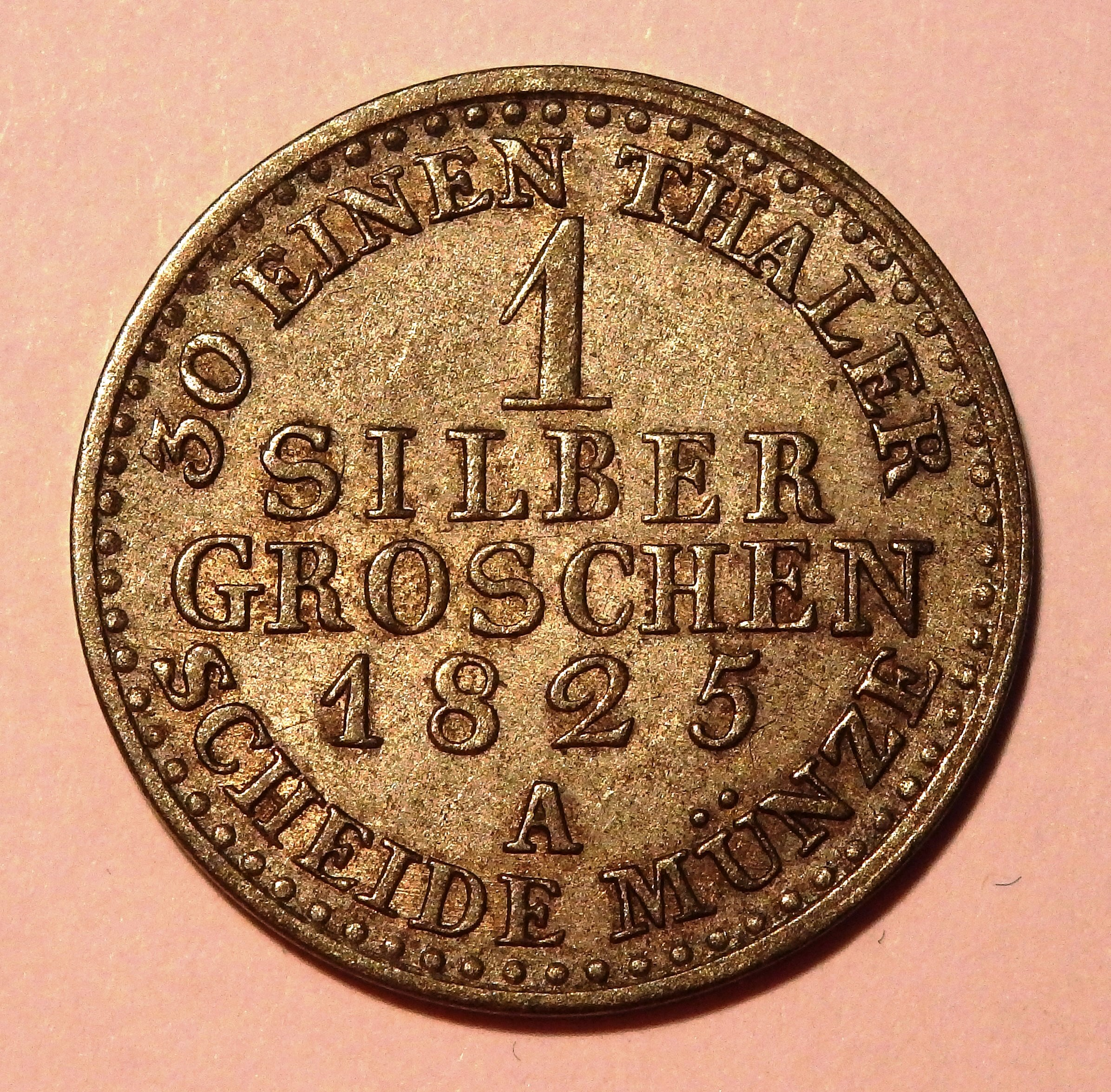 Wertseite des preußischen Silbergroschens von 1825